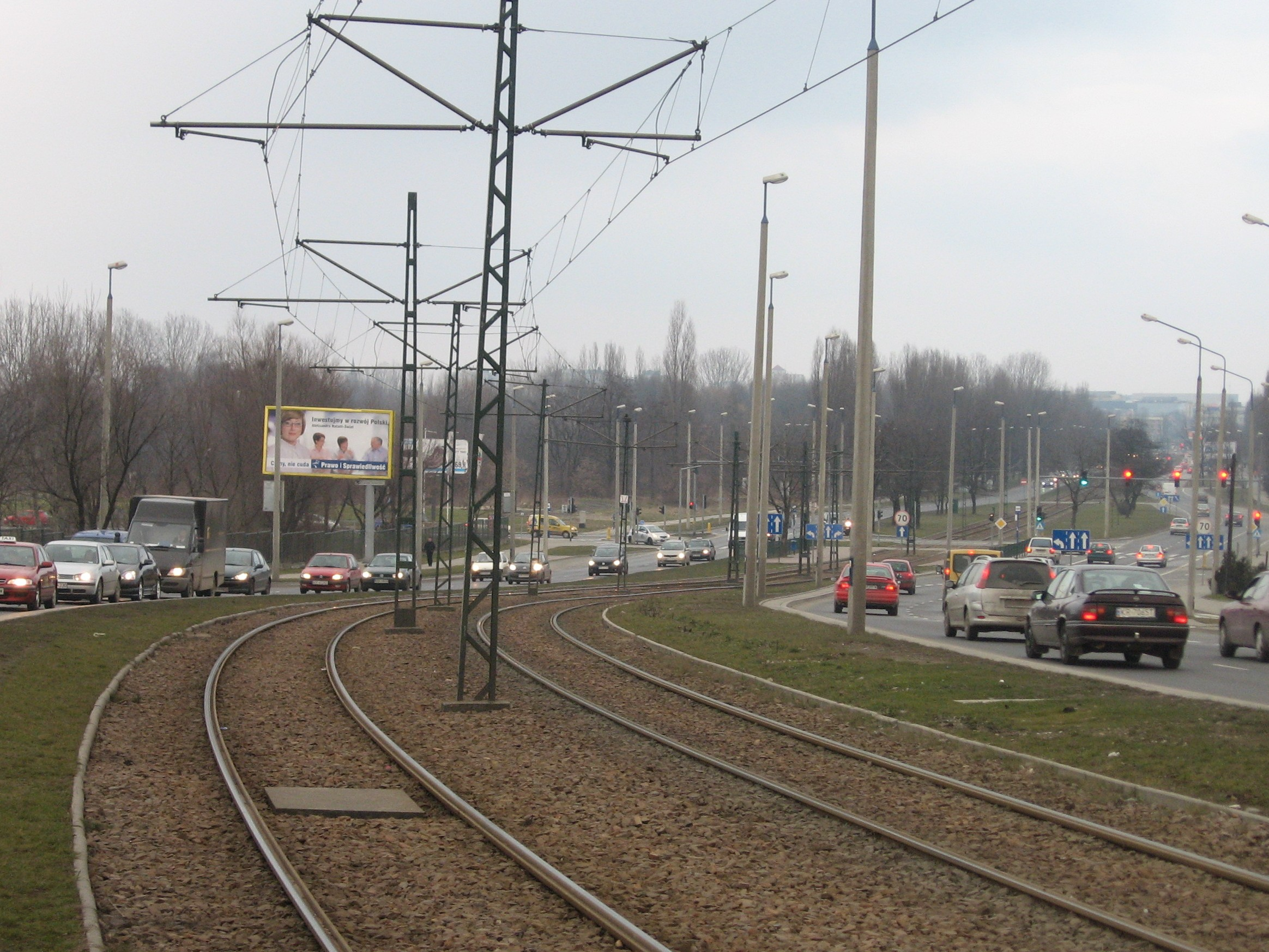 Aleja Pokoju w kierunku Ronda Czyżyńskiego